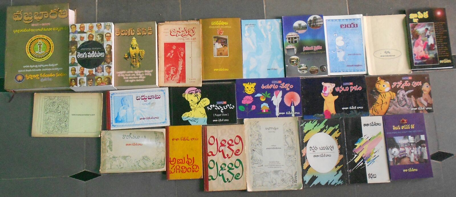 తాతా రమేశ్ బాబు వ్రాసిన పుస్తకాలు